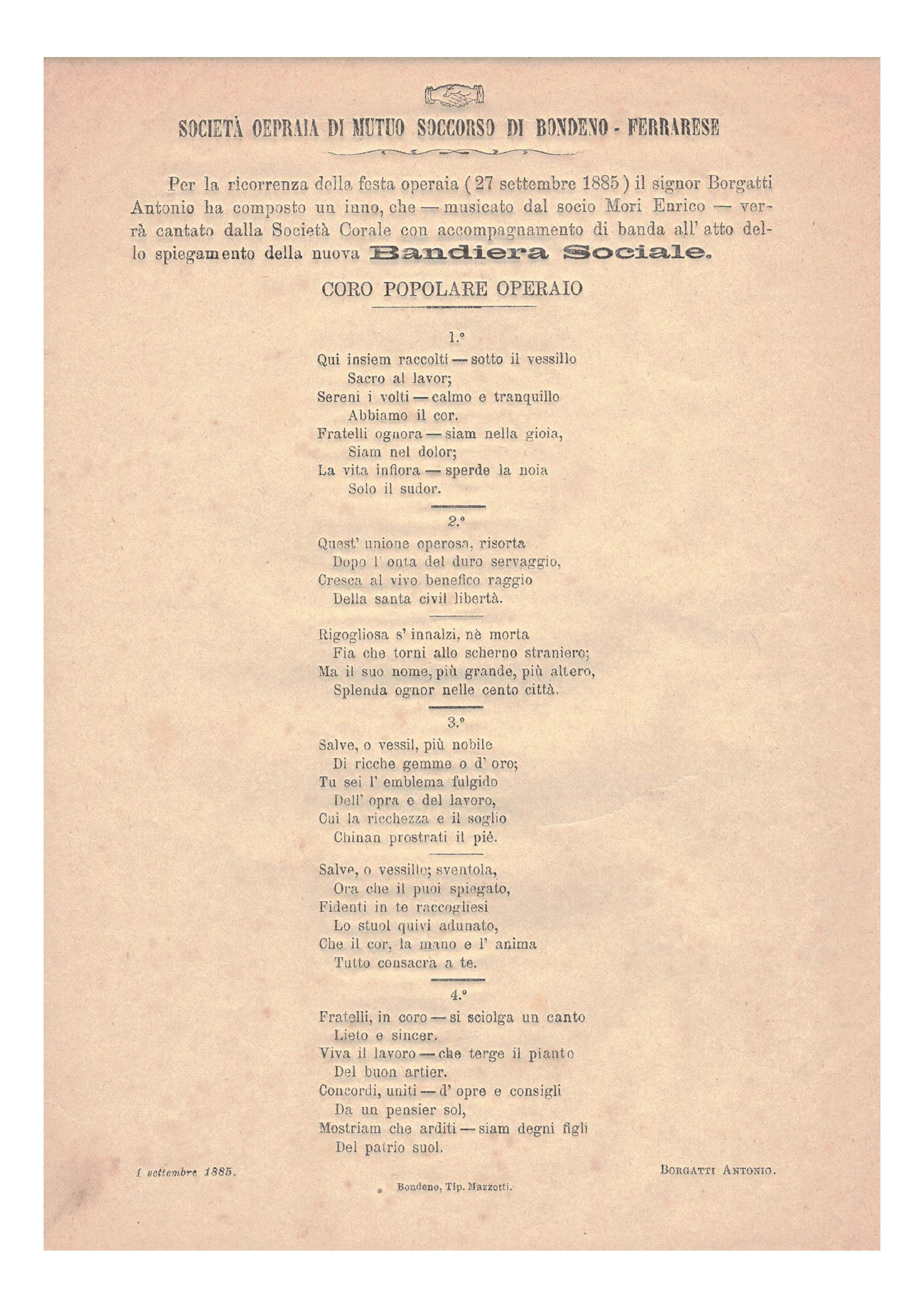 Coro popolare operaio (1885) A. Borgatti - E. Mori